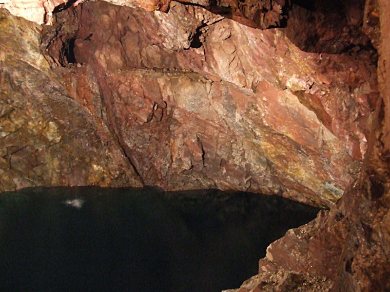 Zinnerzgrube Tannenberg, unterirdischer See im abgebauten Greisenkörper